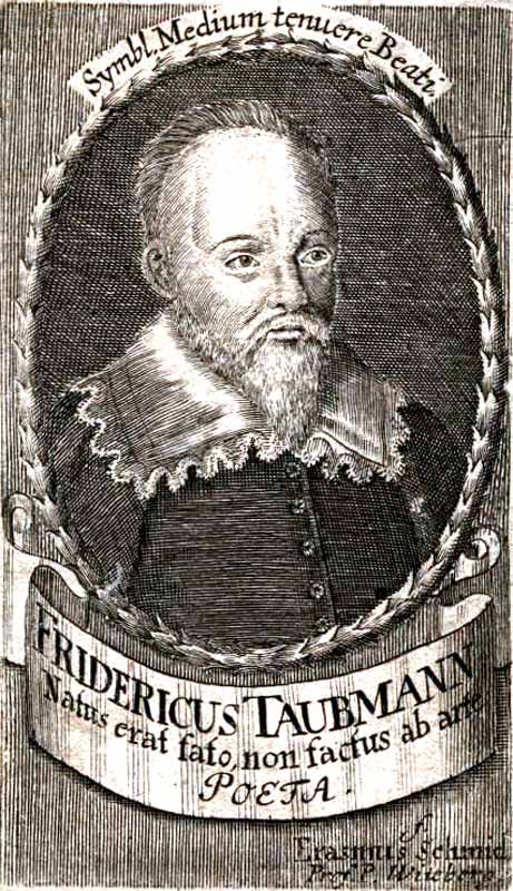 Friedrich Taubmann (* 16. Mai 1566 in Wonsees bei Bayreuth, † 24. März 1613 in Wittenberg), bedeutender deutscher Philologe und lateinischer Dichter der Barockzeit